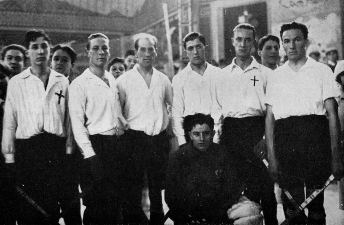 Hockey Club Milano nel 1924. Il terzo da sinistra è Quaglia.